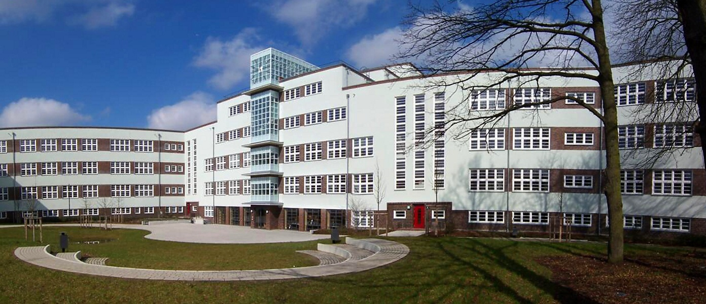 Innenhof des Innerstädtischen Gymnasiums in Rostock